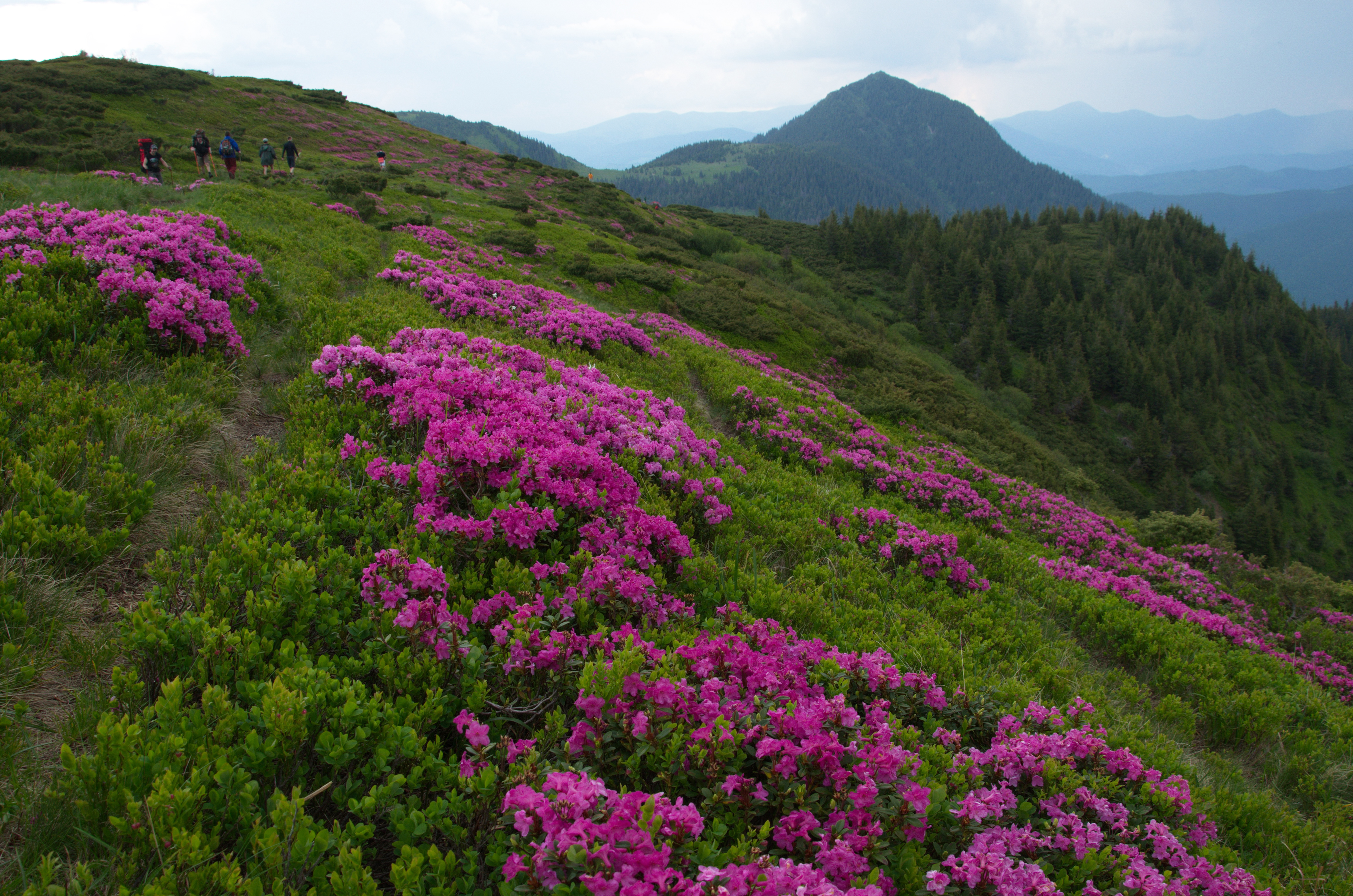 Карпатський біосферний заповідник, Рахівський, Тячівський, Хустський, Виноградівський райони